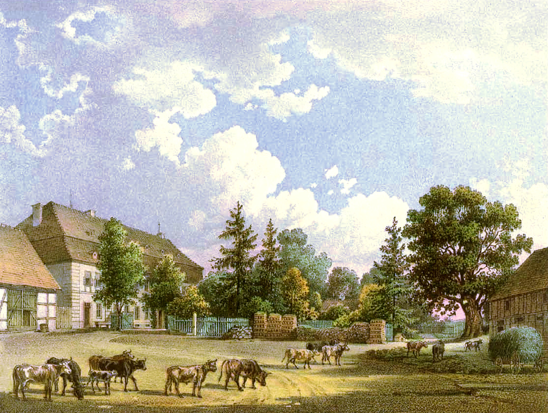 Rittergut Oswitz, Kreis Breslau